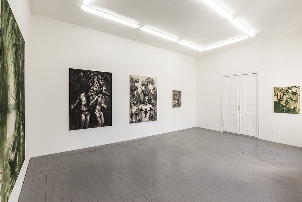 Golden Sands, 2012, Andrej Dubravsky, JIri Svestlka Gallery, Berlin